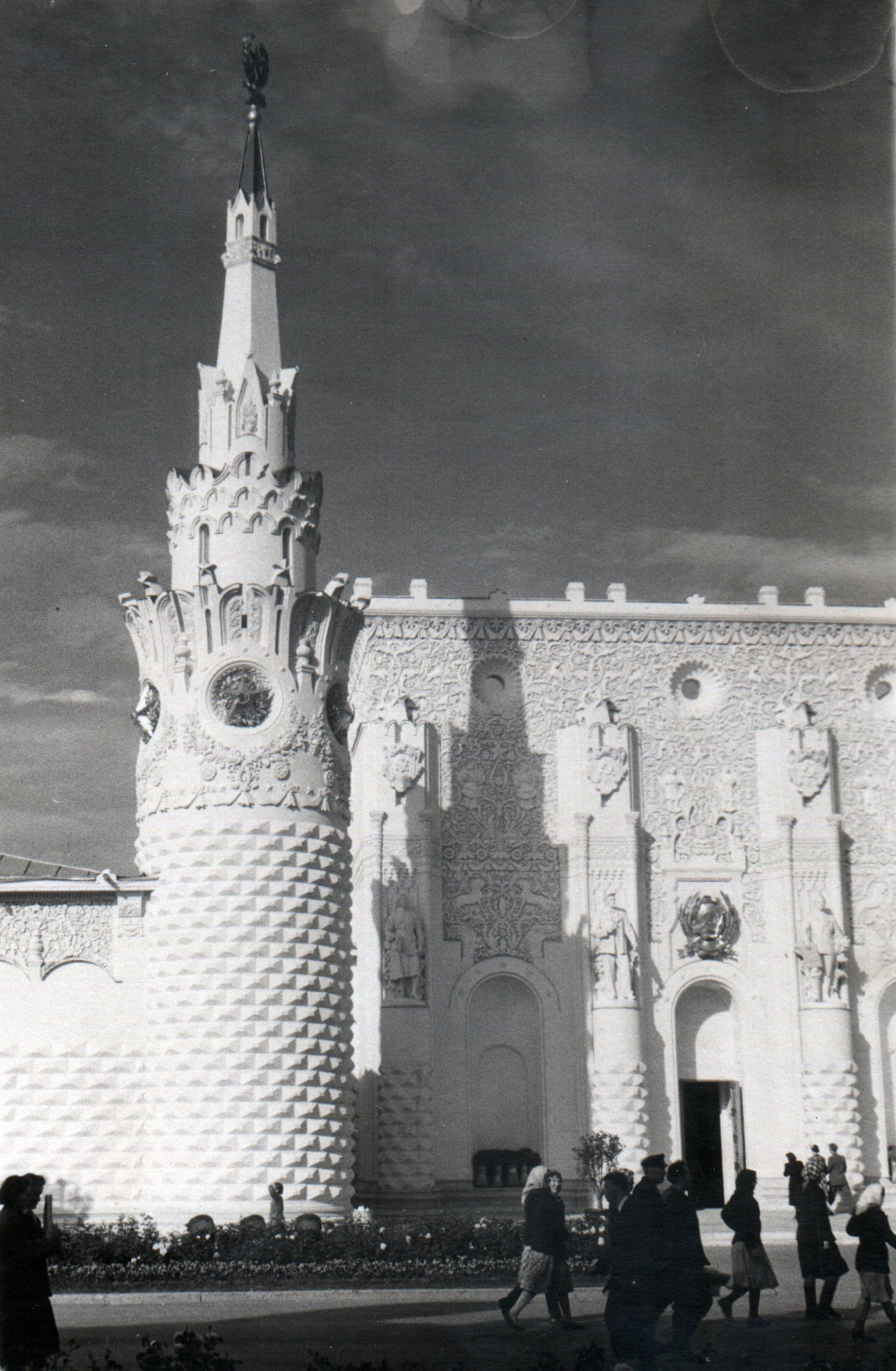 ВСХВ, павильон Центральных промышленных областей, 1955 год. Впервые построен в 1937-1938, перестроен до изображённого облика в 1950-1954, снесен в 1966. Располагался на Центральной аллее, рядом с местом, где позже построили павильон 57 (но ближе к оси бульвара).